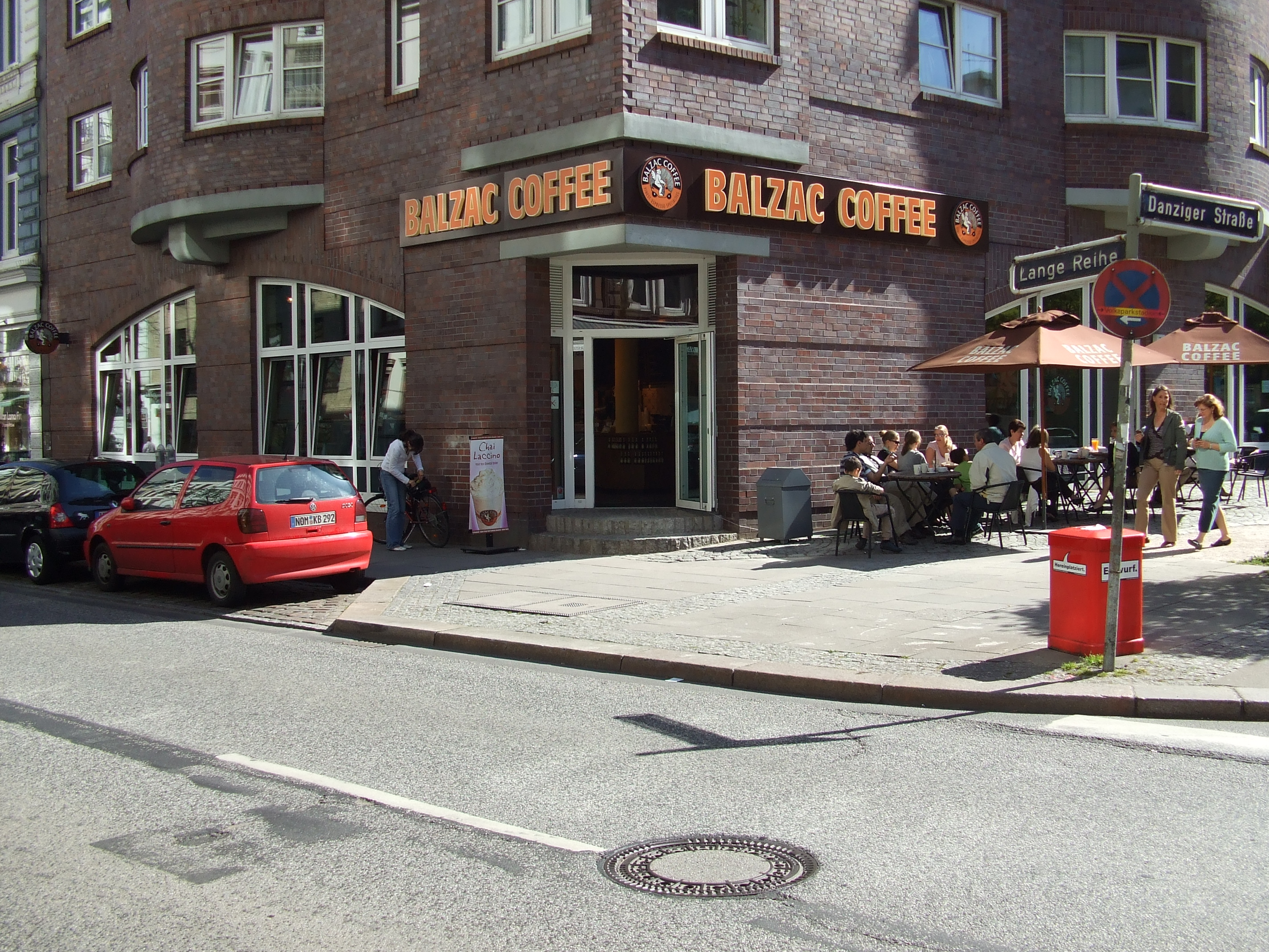 Stehcafé der Kette Balzac Coffee in der Langen Reihe in St. Georg